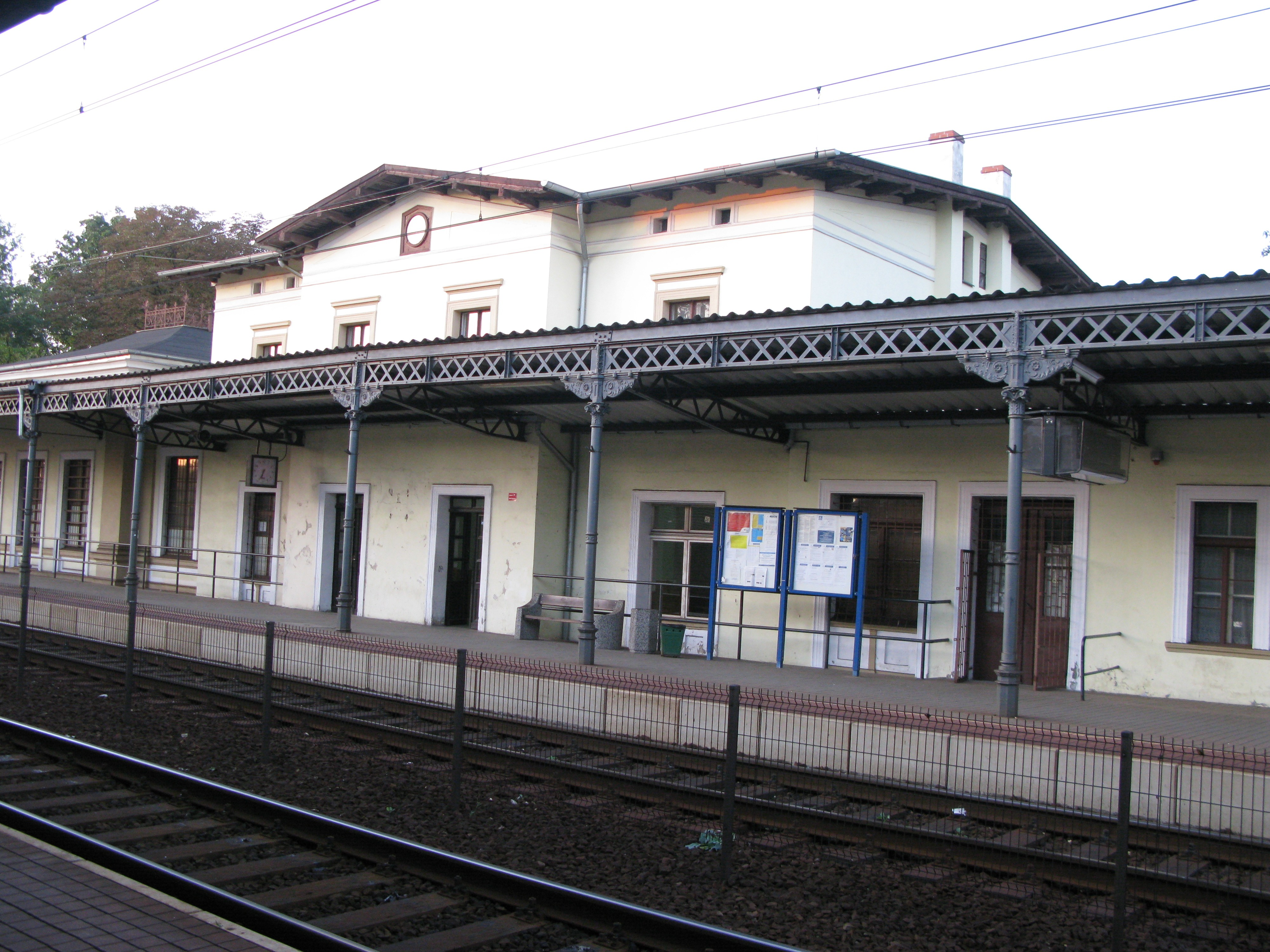 Budynek dworca PKP i Wiata peronowa Oława, ul. Kolejowa